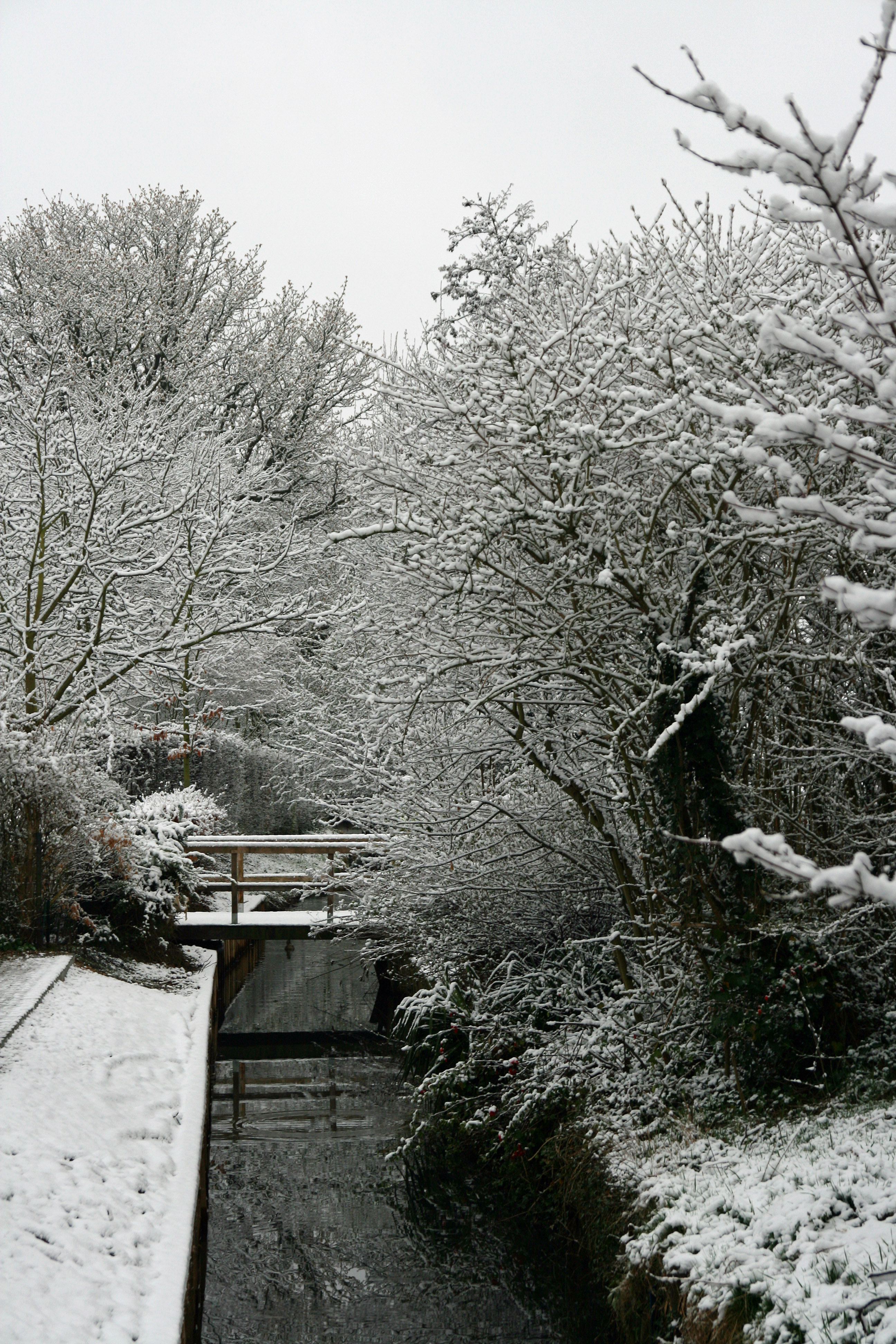 Maasnielderbeek